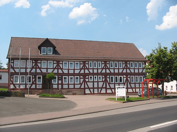 Wartenbergs Rathaus im Ortsteil Angersbach